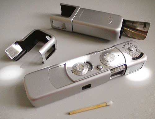 密诺斯 B微型相机 来自 wiki 德文版 Minox